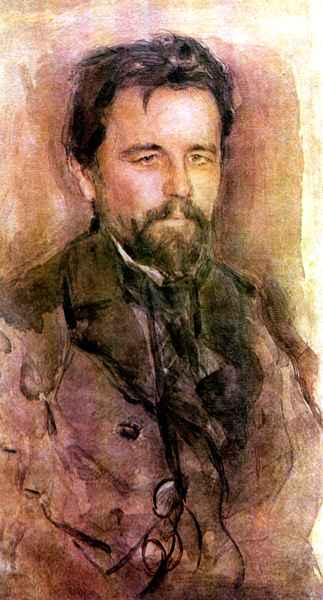 В.А.Серов. Портрет А.П.Чехова